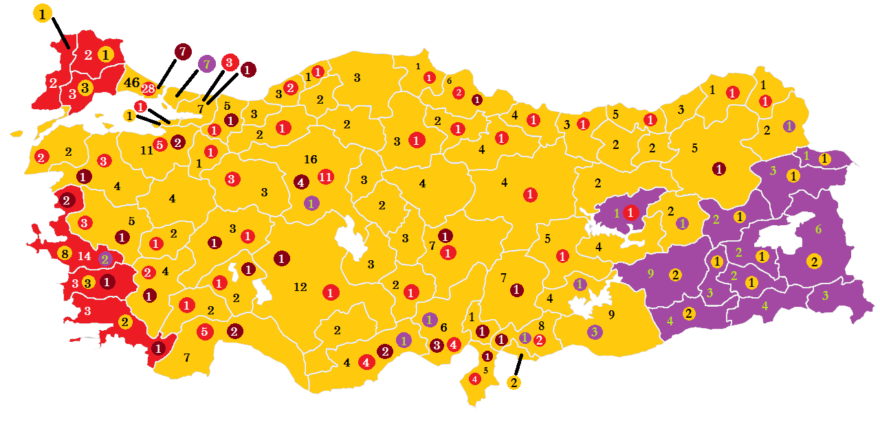 İllere göre çıkarılan milletvekili sayısı